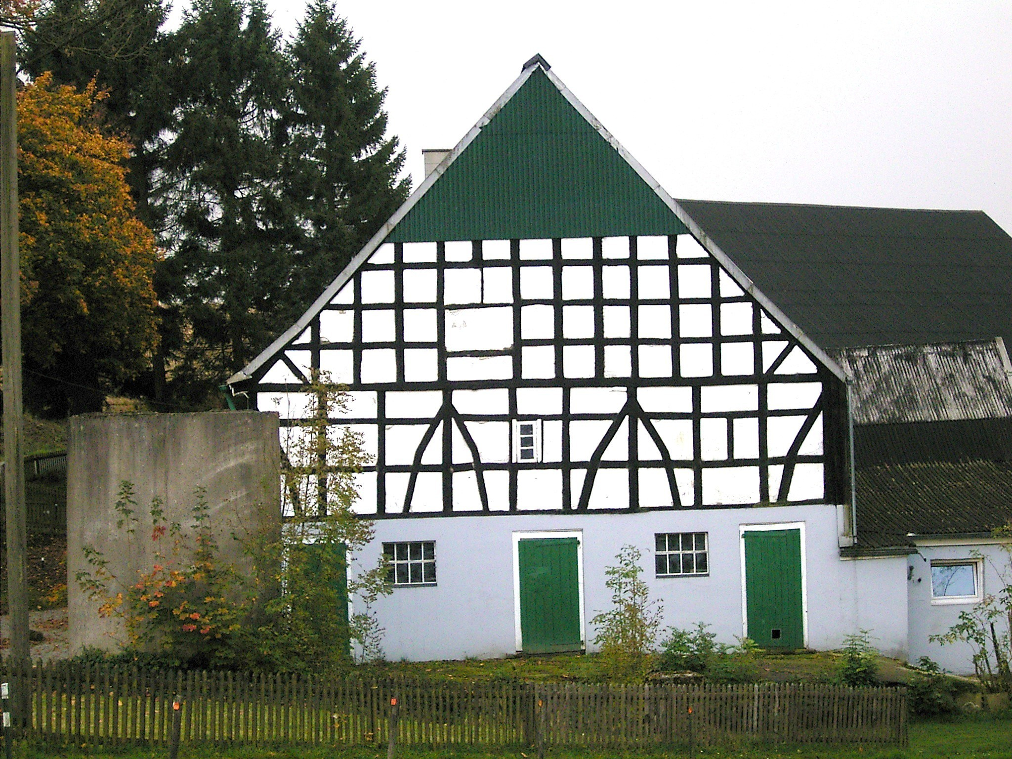 Radevormwald